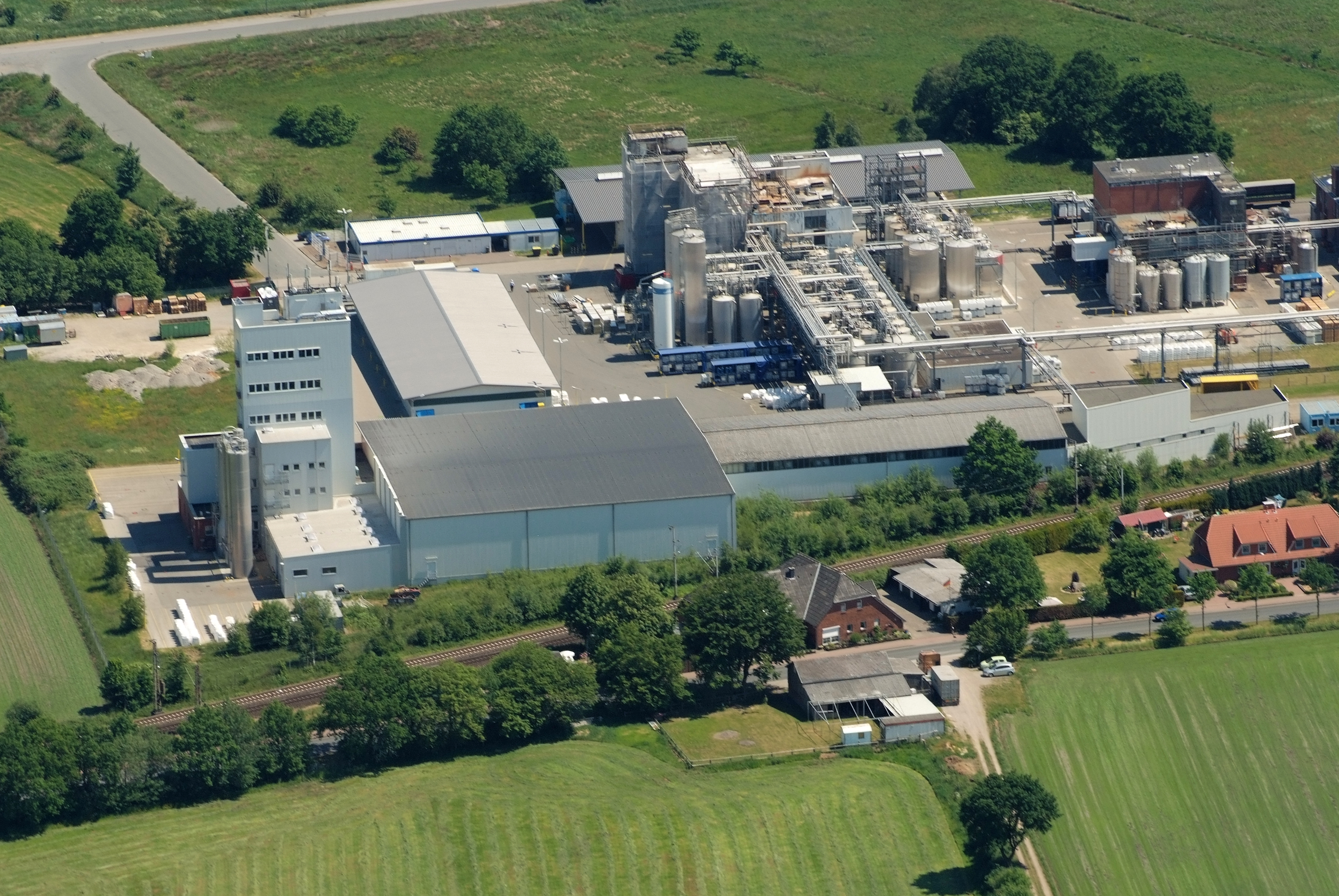 Reagens-Werk in Loxstedt Fotoflug vom Flugplatz Nordholz-Spieka über Cuxhaven und Wilhelmshaven